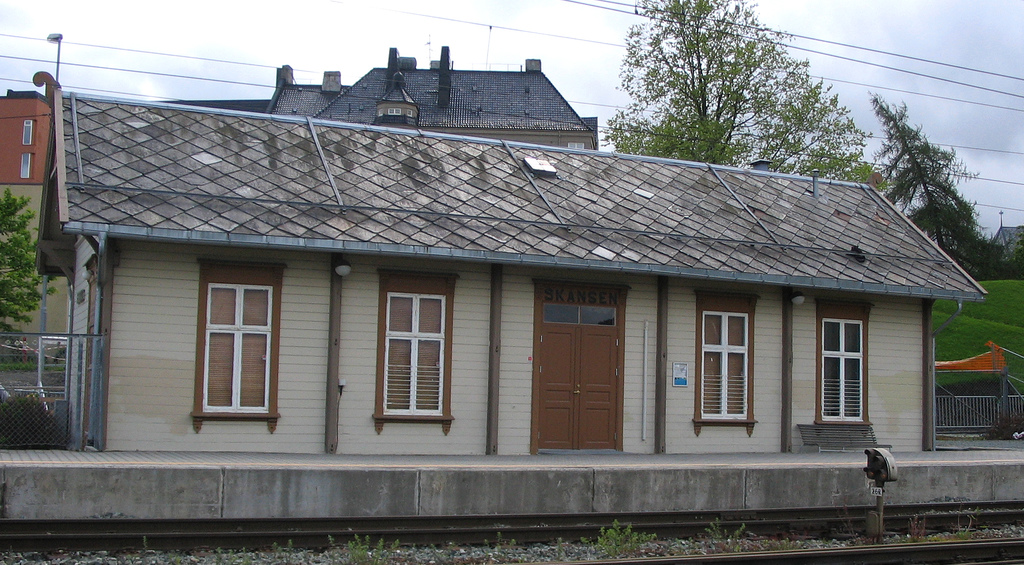 Skansen railroad station in Trondheim june 2006.